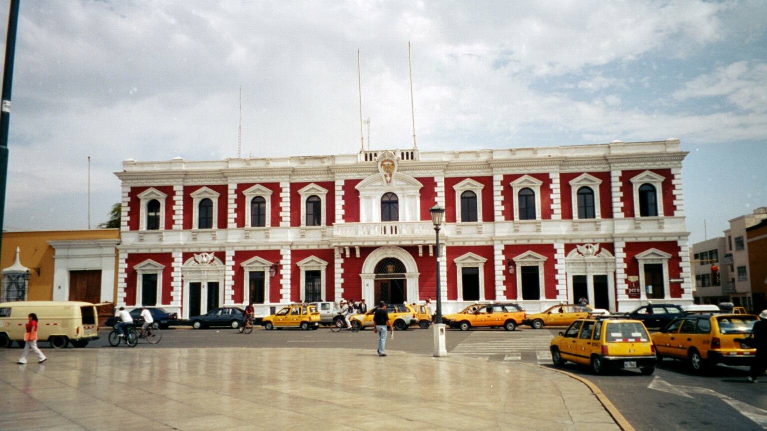 Rathaus (Municipalidad) an der Plaza de Armas, jetzt blau (in der Farbe der regierenden Partei)